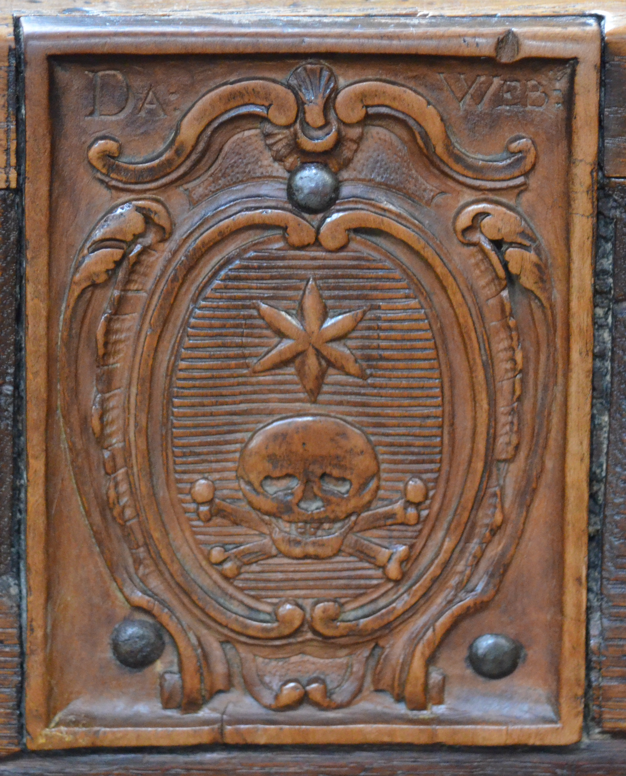 Bern, Münster, Kirchenortschild David Wäber Detail